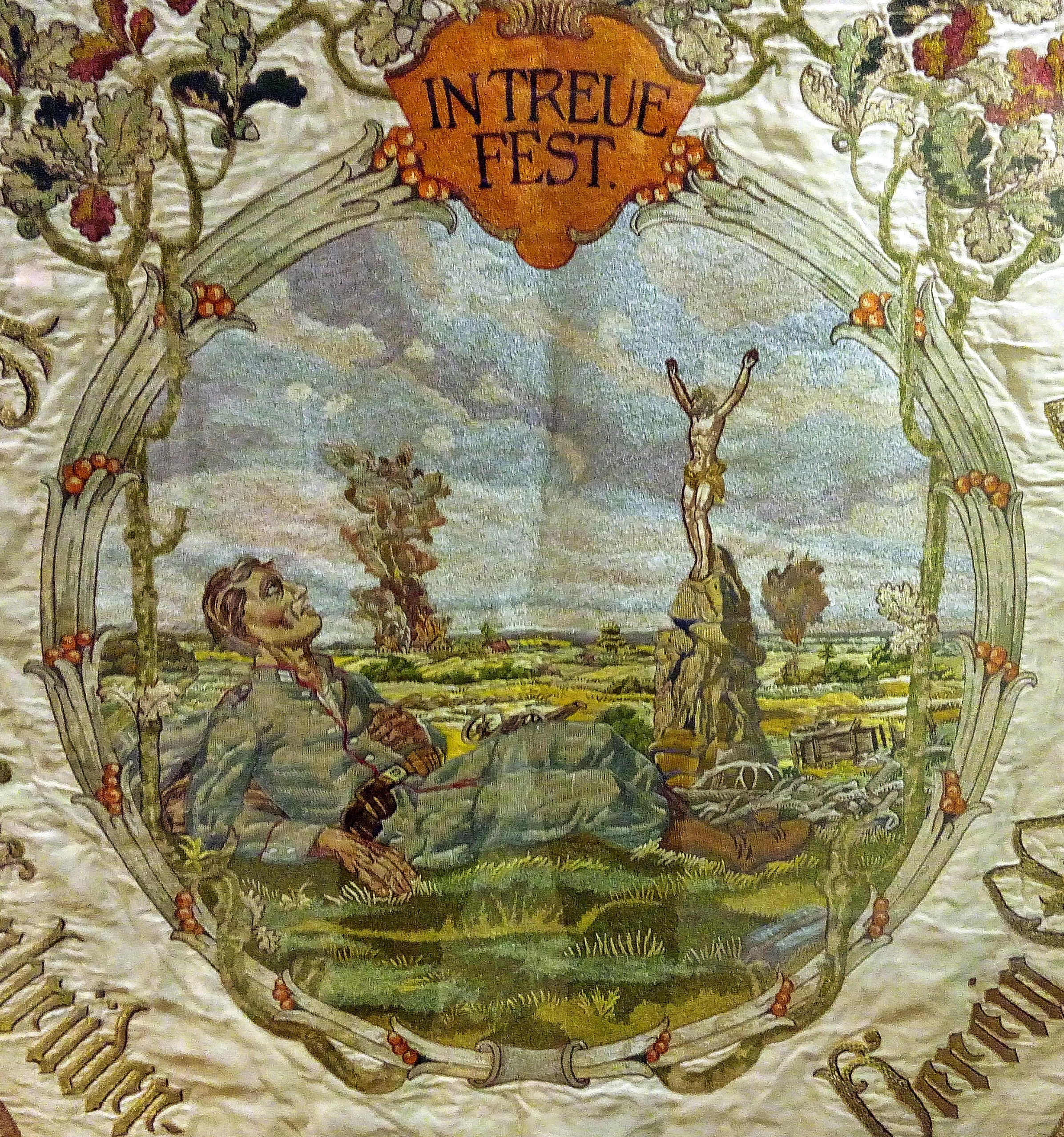 Sogenanntes Kreuz bei Saarburg (in Buhl stehend), dem am 20.8.1914 das Kreuz wegeschossen wurde und die Christusfigur stehen blieb. Stickerei auf historischer Kriegervereinsfahne Mühlheim an der Eis, heute Museum Grünstadt.